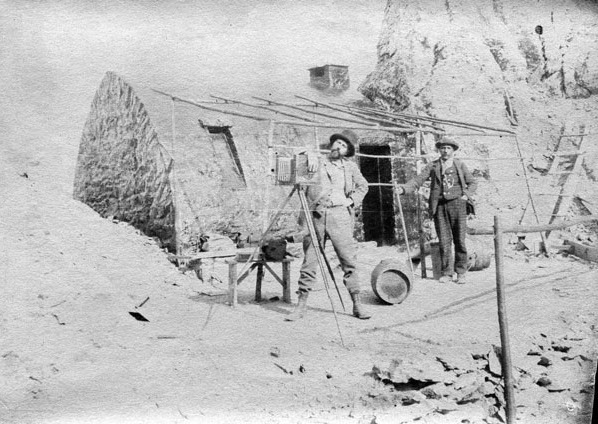 Fonds Trutat - Photographie ancienne Cote : TRU C 567 Localisation : Fonds ancien (S 30) Original non communicable Titre : Abri de Tuquerouye, [Félix] Regnault, Henri Passet, octobre 1892 Auteur : Trutat, Eugène Rôle de l’auteur : Photographe Lieu de création : Tuquerouye (Hautes-Pyrénées) Date de création : 1892 Mesures : : 8 x 12 cm Observations : Notes de la main de E. Trutat : "hemisph. Darlot f. 11, papier en rouleau Eastman?" Mot(s)-clé(s) : -- Montagne -- Sommet (montagne) -- Alpinisme -- Guide de montagne -- Abri -- Homme -- Porte -- Bois -- Appareil -- Photographie -- Maison -- Automne -- Regnault, Félix -- Passet, Henri -- Mont-Perdu (Hautes-Pyrénées) -- Tuquerouye (Hautes-Pyrénées) -- Tuquerouye, Echelle de (Hautes-Pyrénées ; col) -- Tuquerouye, Refuge de (France) -- Midi-Pyrénées (France) -- Pyrénées (France) -- 19e siècle, 4e quart Médium : Photographies -- Négatifs sur papier -- Noir et blanc -- Eastman -- Portraits Bibliothèque de Toulouse. Domaine public